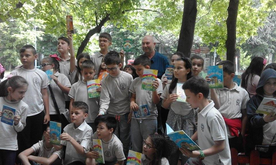 Среща с деца